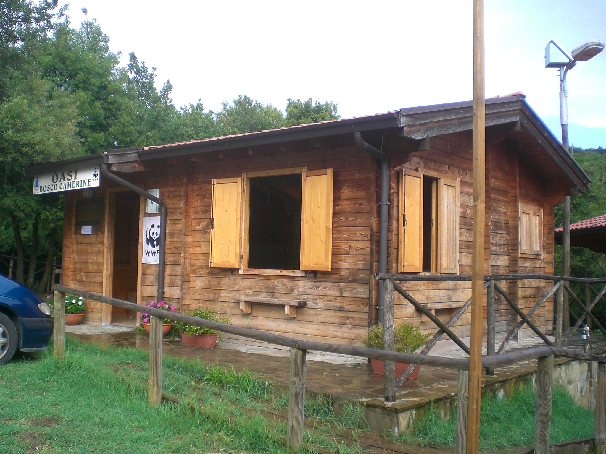 Oasi naturale Bosco Camerine This is a photo of a monument which is part of cultural heritage of Italy. The authorisation for taking photos of this object was provided by the World Wide Fund for Nature Italy.